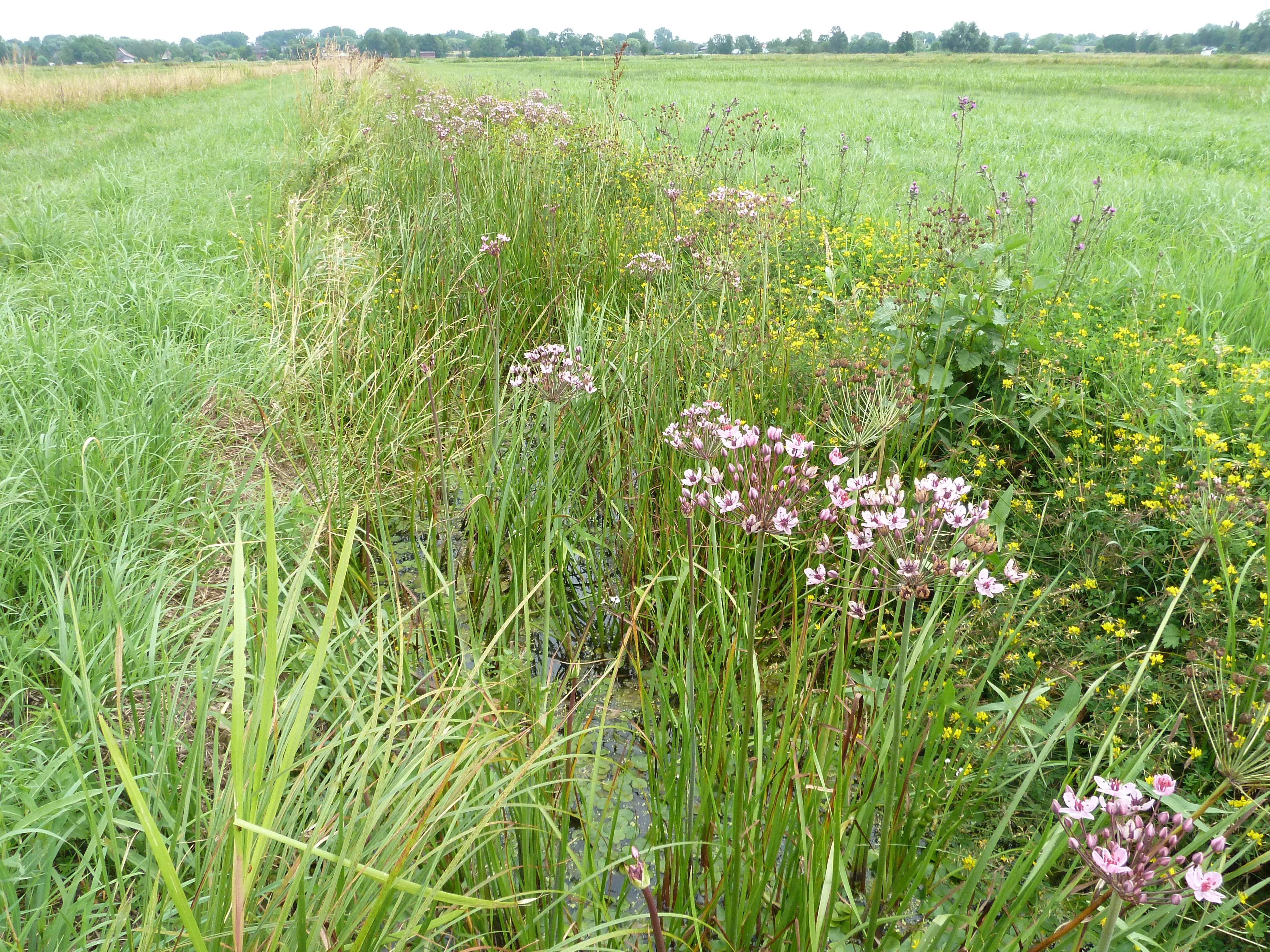 Artenreicher Graben in Hamburg Neuland mit Schwanenblume im Vordergrund